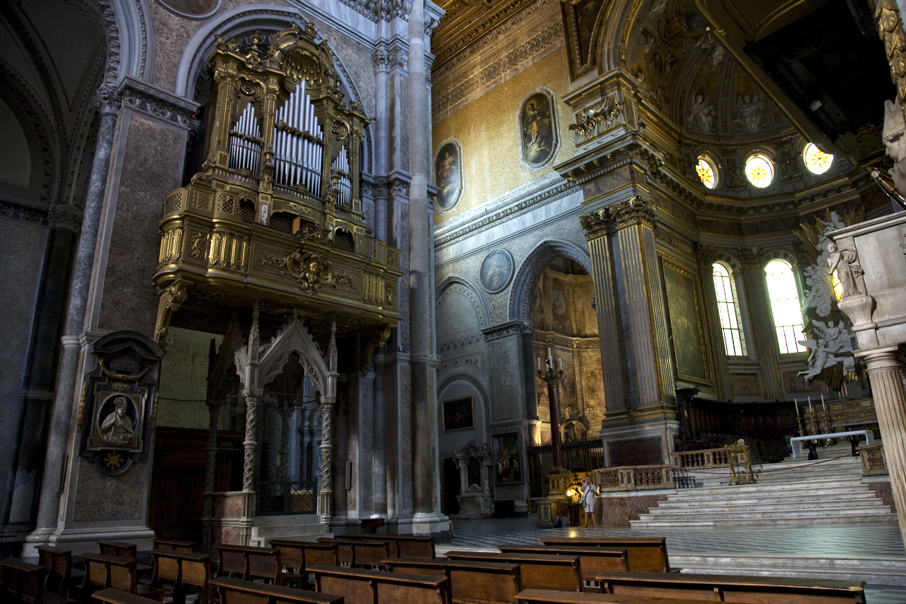 Cattedrale di San Gennaro